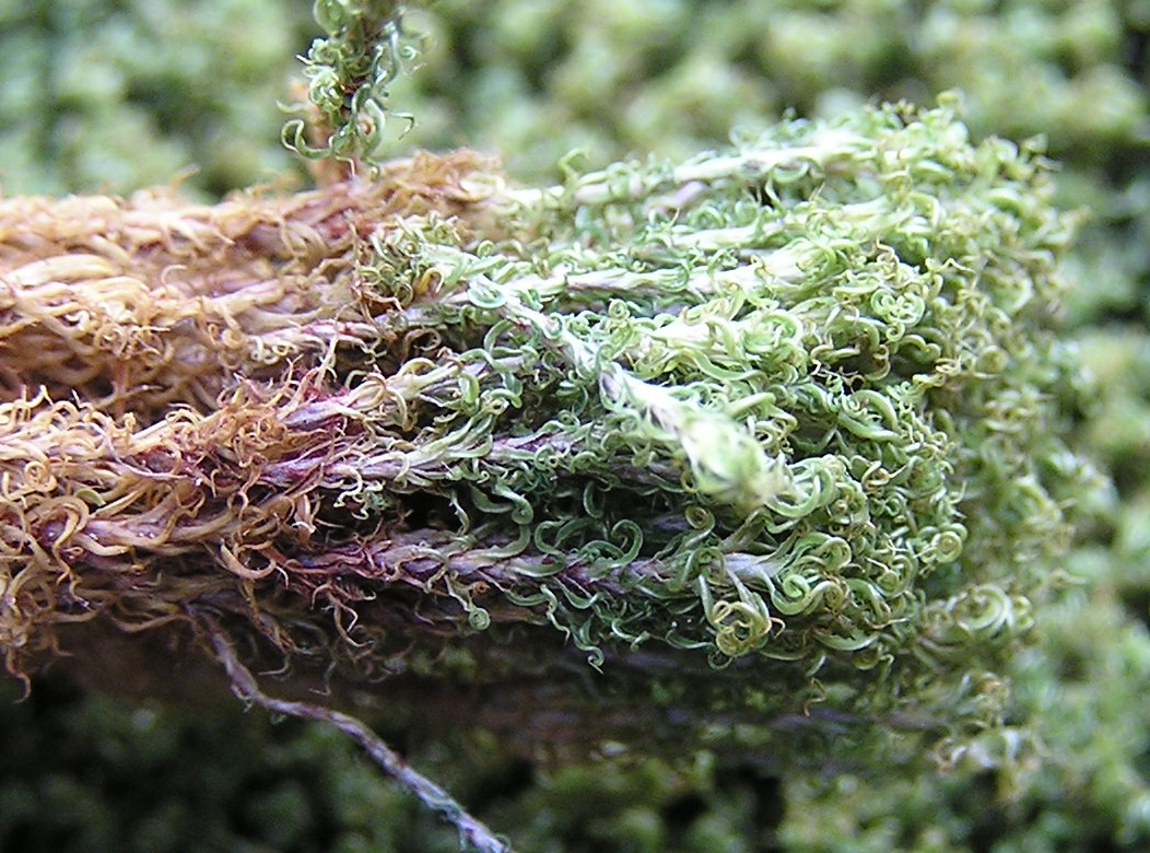 Tortella tortuosa am Krippenstein im Dachsteinmassif, Österreich.